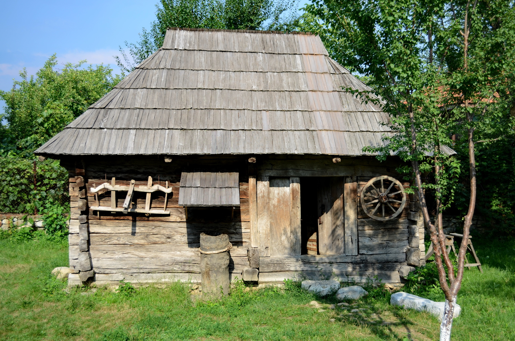 Casa - Muzeu "Constantin Brâncuși"